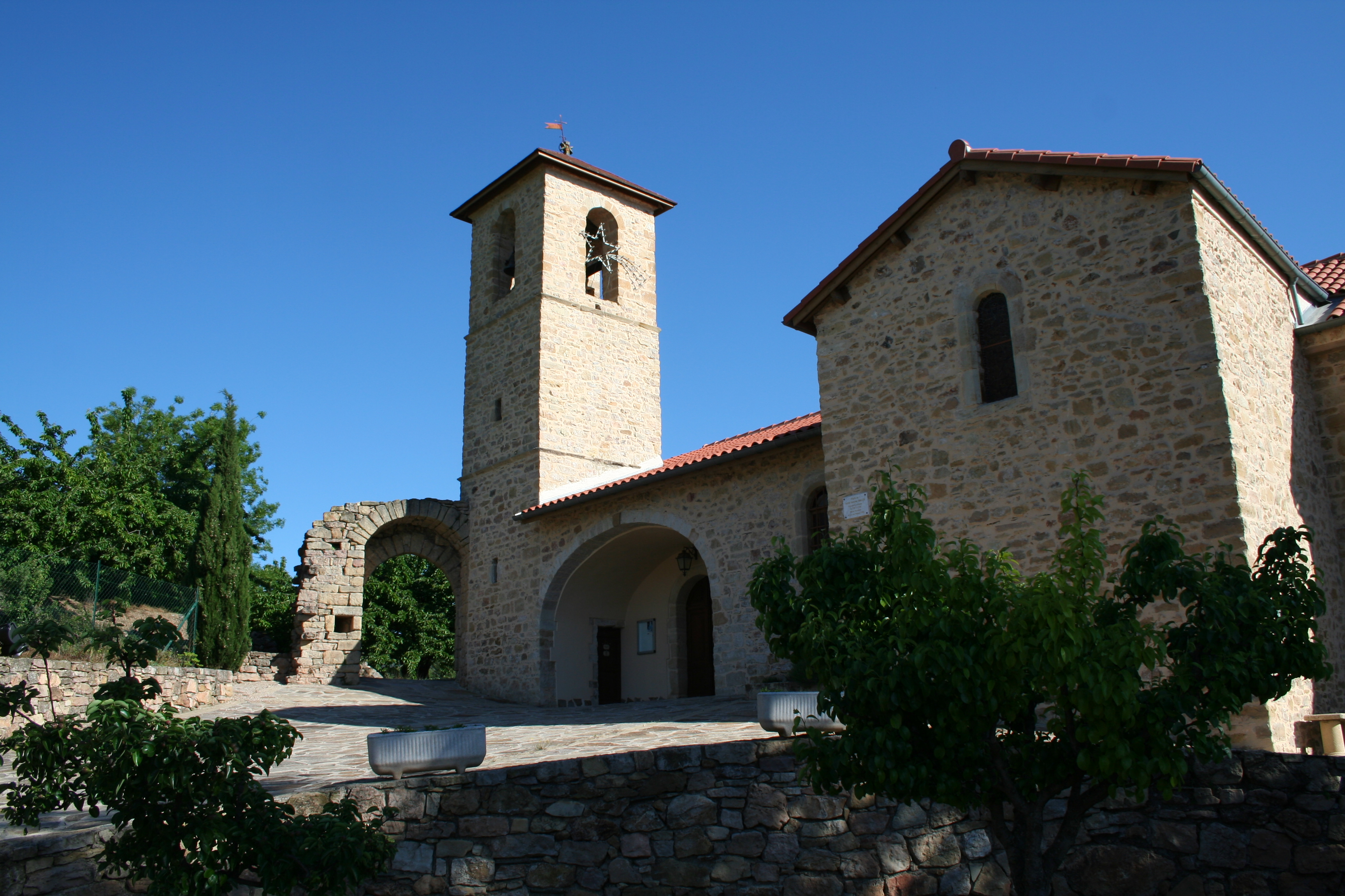 Taussac-la-Billière (Hérault) - église Notre-Dame de Pitié.